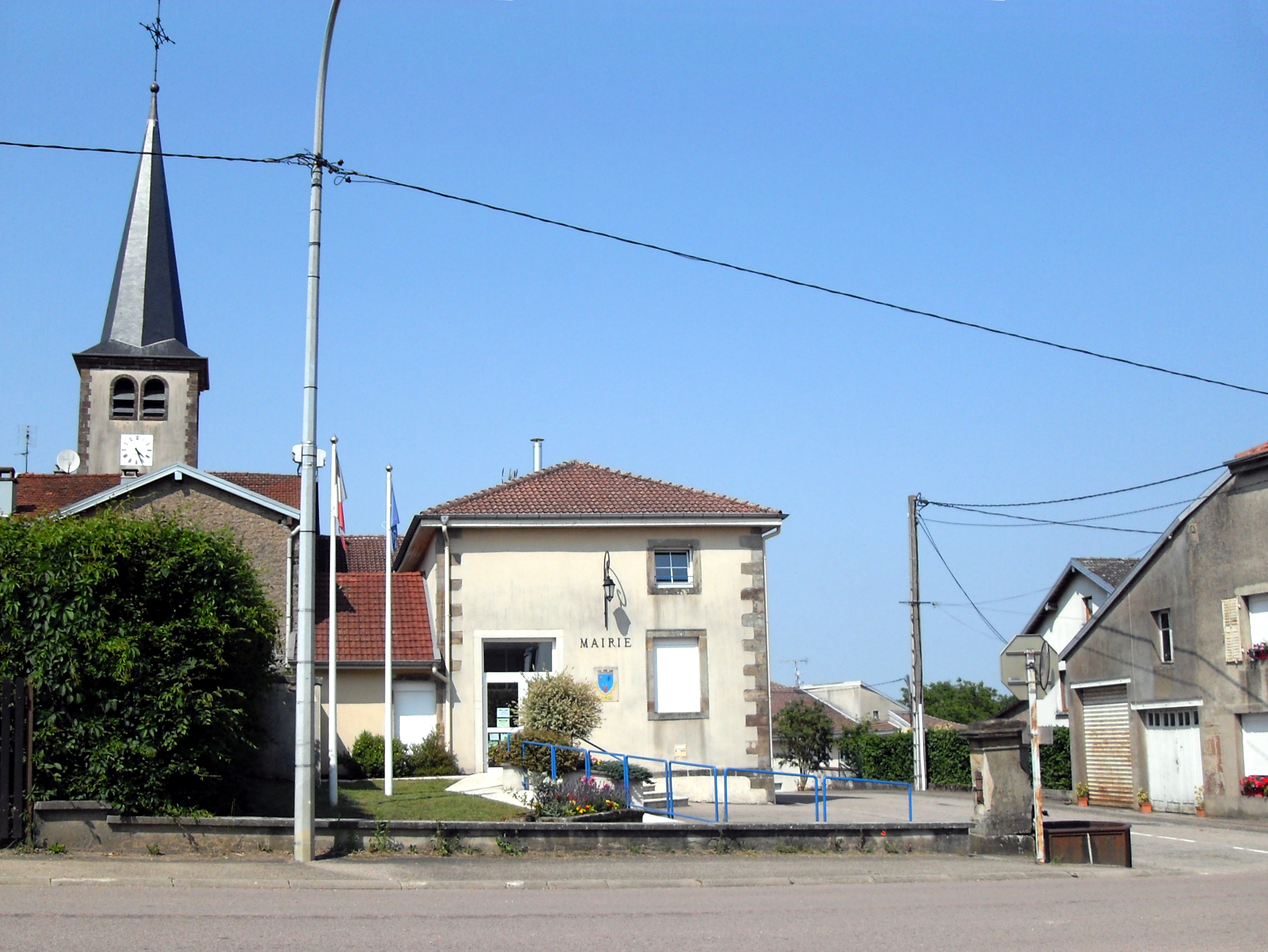 La mairie de Romont